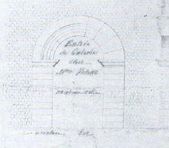 entrée de l'amphithéâtre sur un dessin de 1854